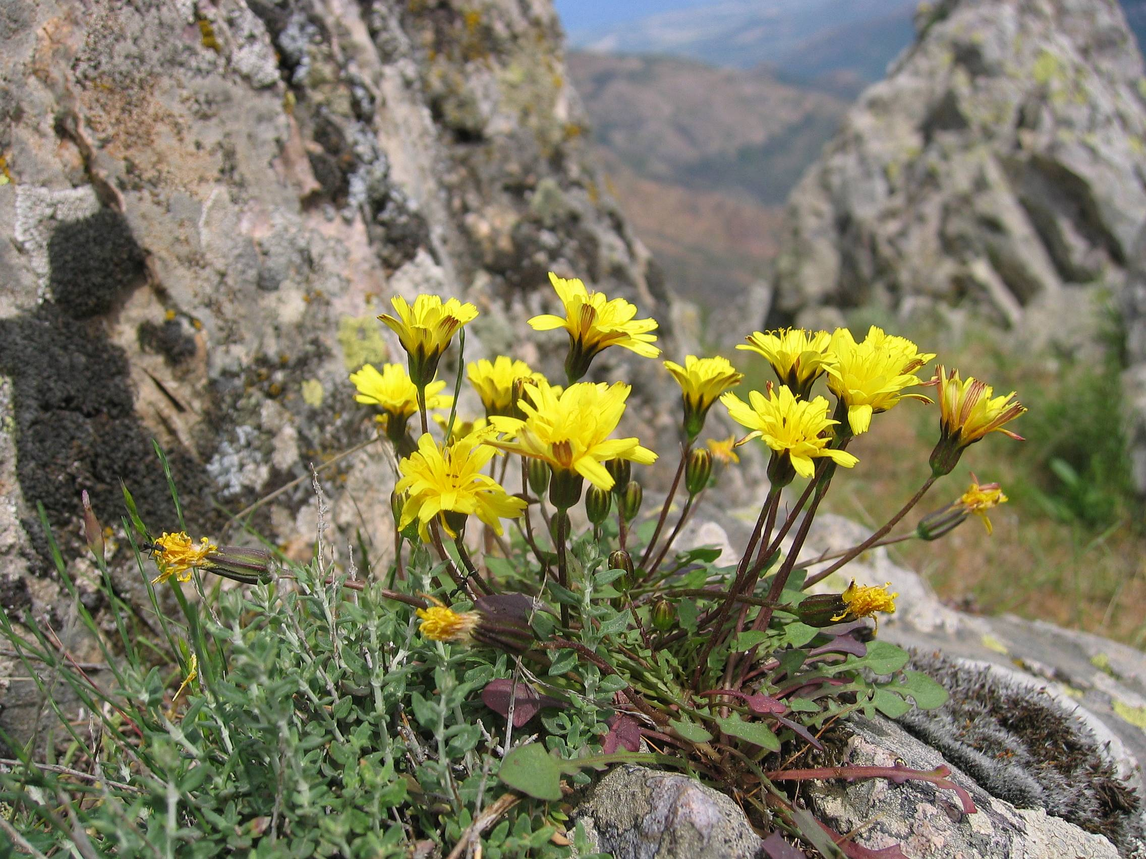 Hypochaeris robertia, near Bocca di Bonassa ~1100, Corse